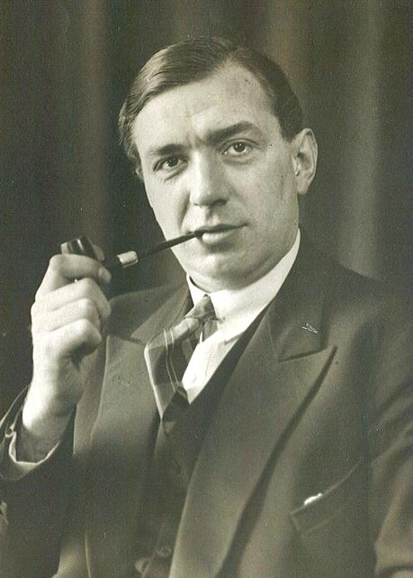 portrett, mann, journalist, forfatter, sittende halvfigur, pipe.